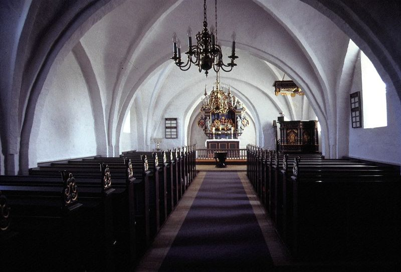 Favsing Kirke i Danmark. Skibet set mod øst